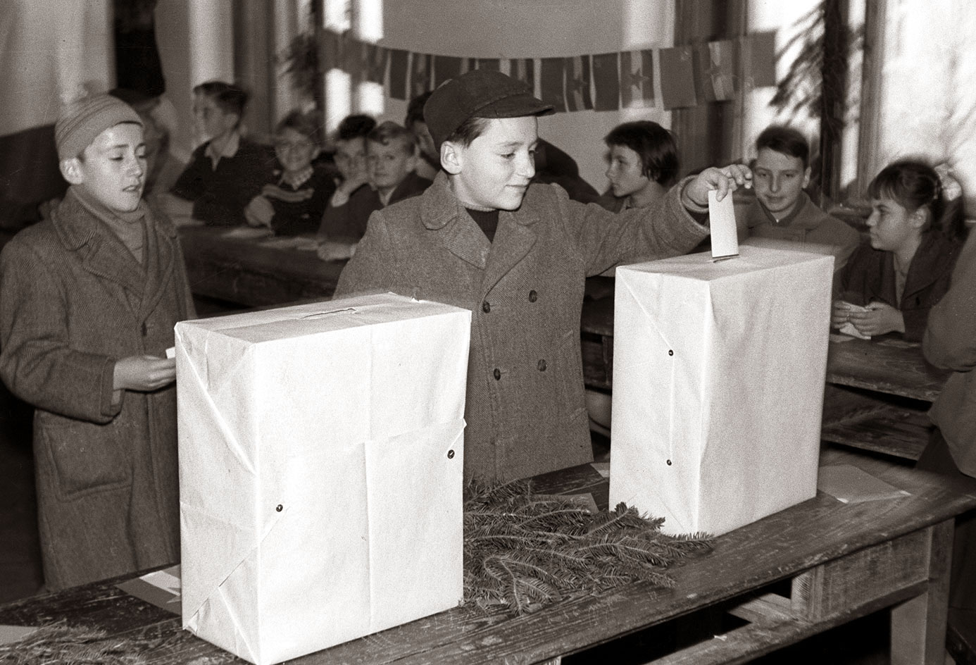 Pionirji na Klasični gimnaziji volijo svoj štab odreda.